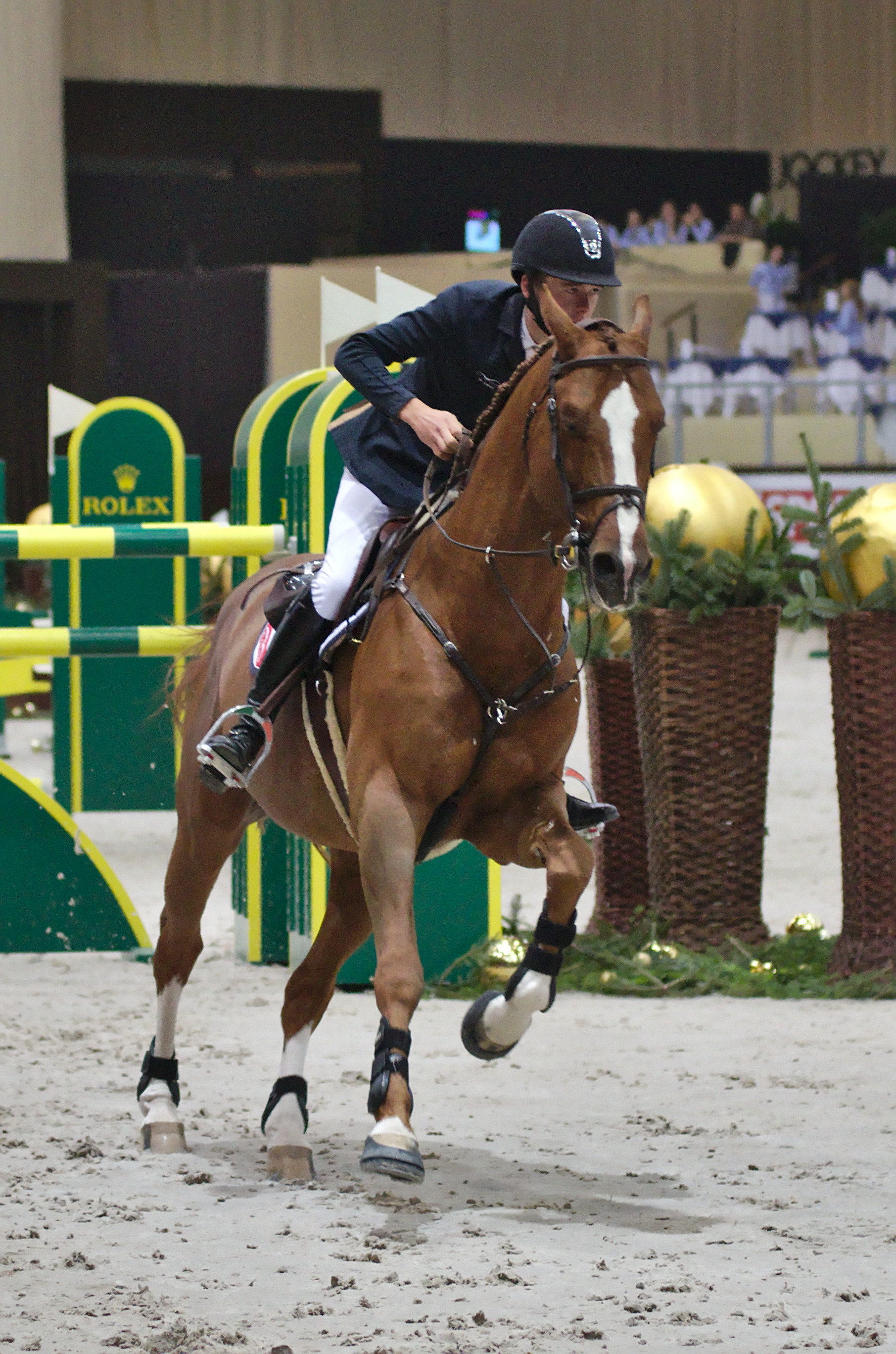 CHI Genève 2013 - 20131214 - Bertram Allen et Romanov